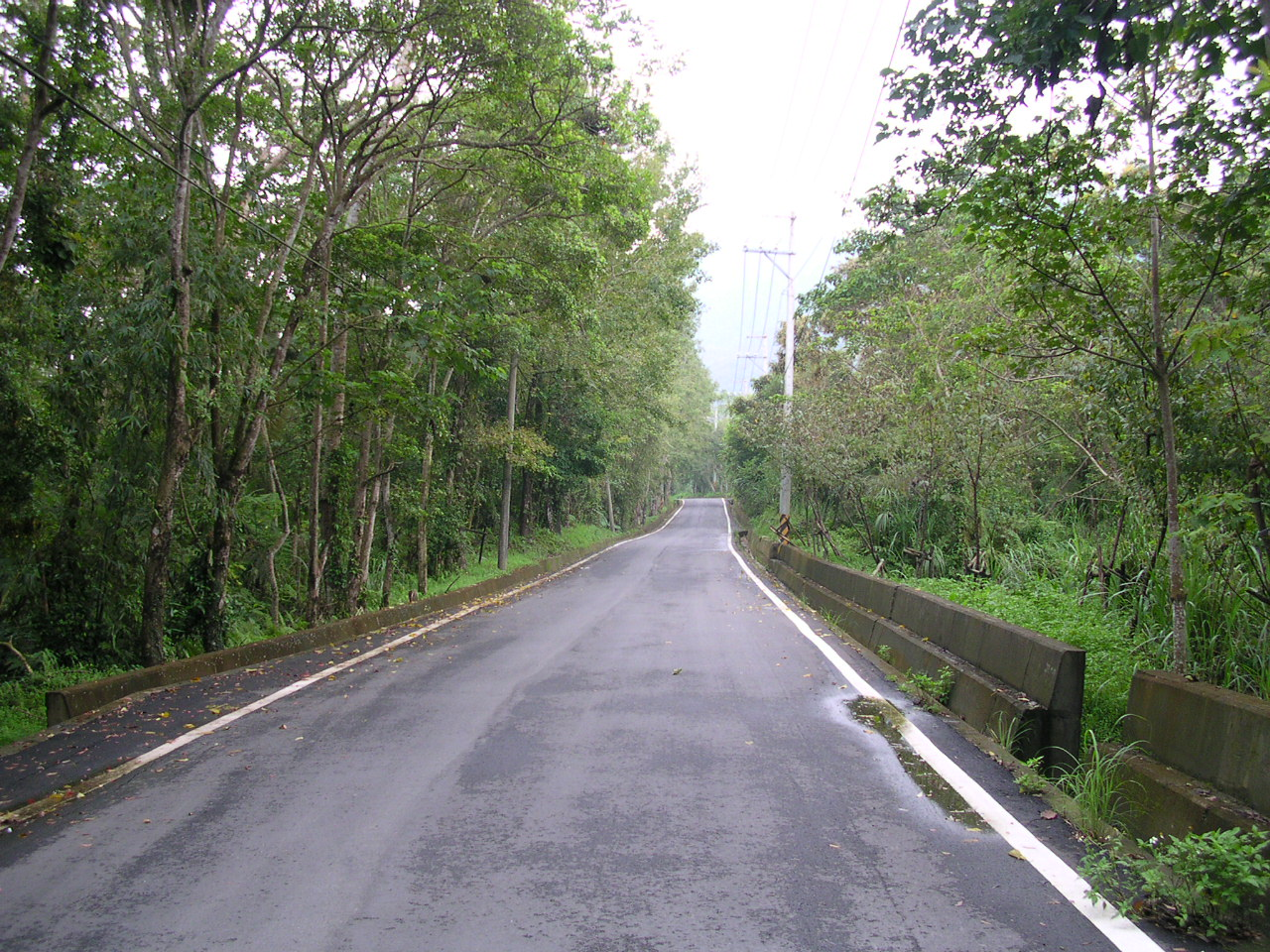 臺灣羅馬公路，由vegafish親自拍攝